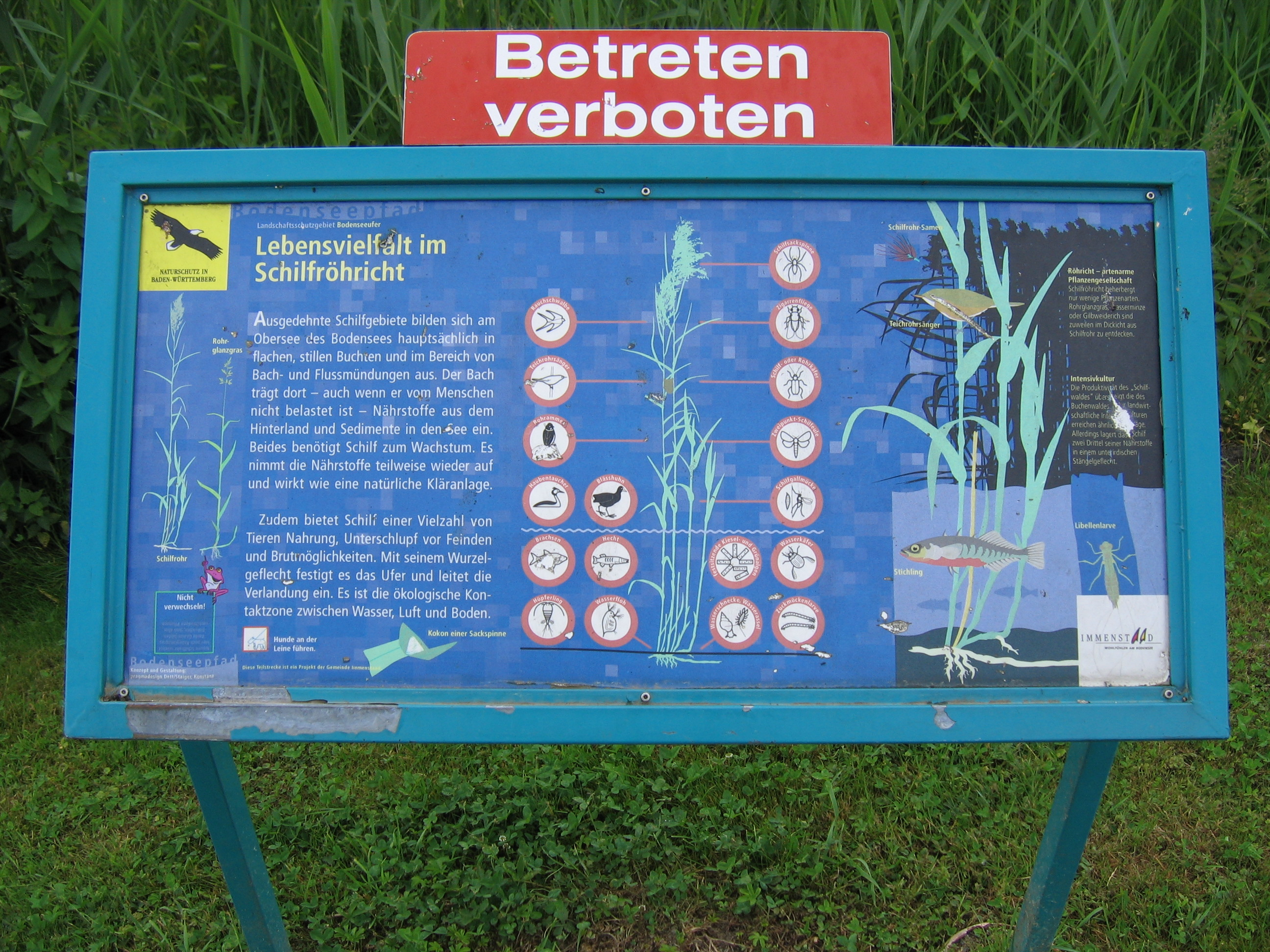 D-Immenstaad: Bodenseepfad-Infotafel "Schilfröhricht"